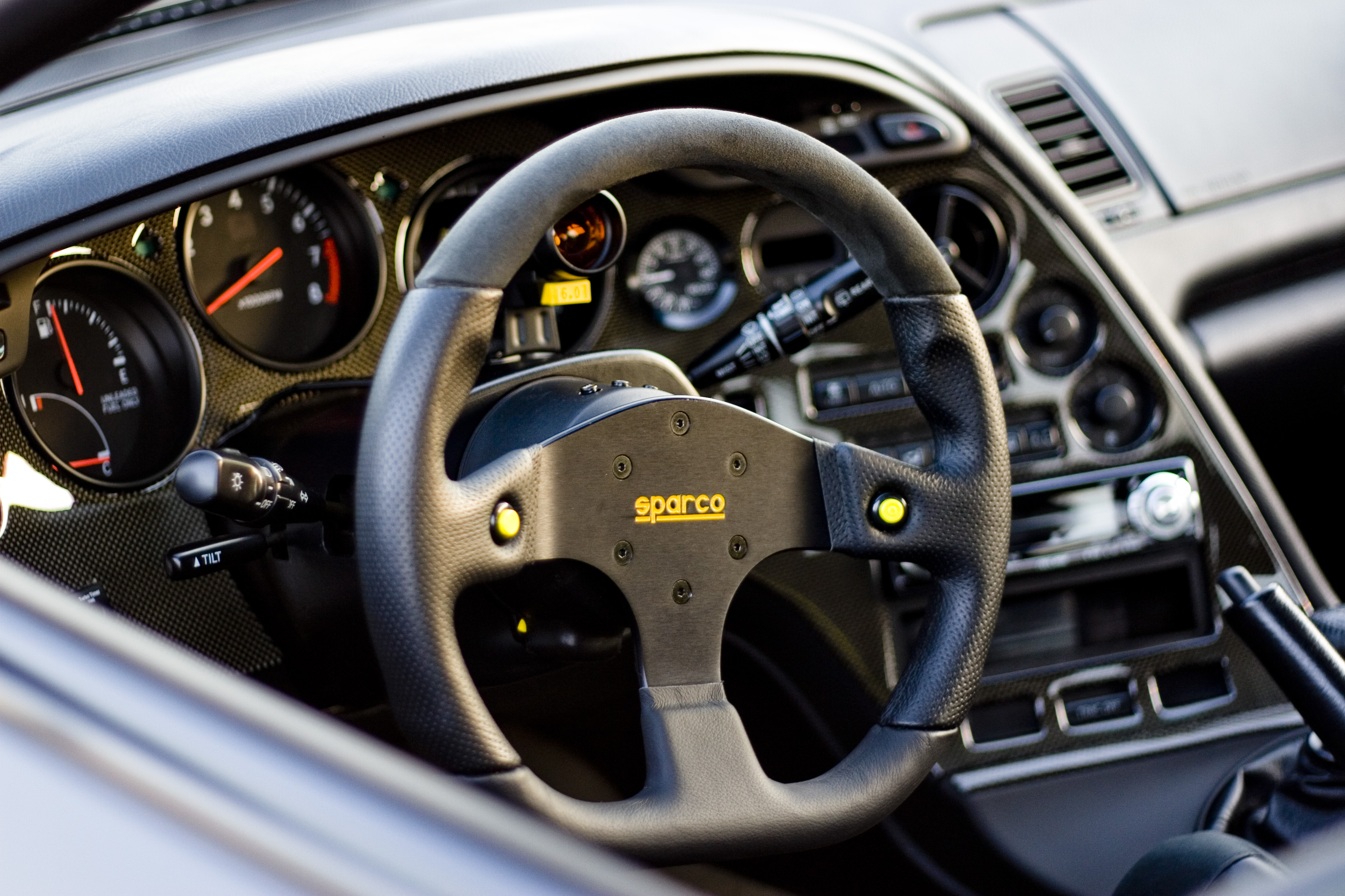 sparco